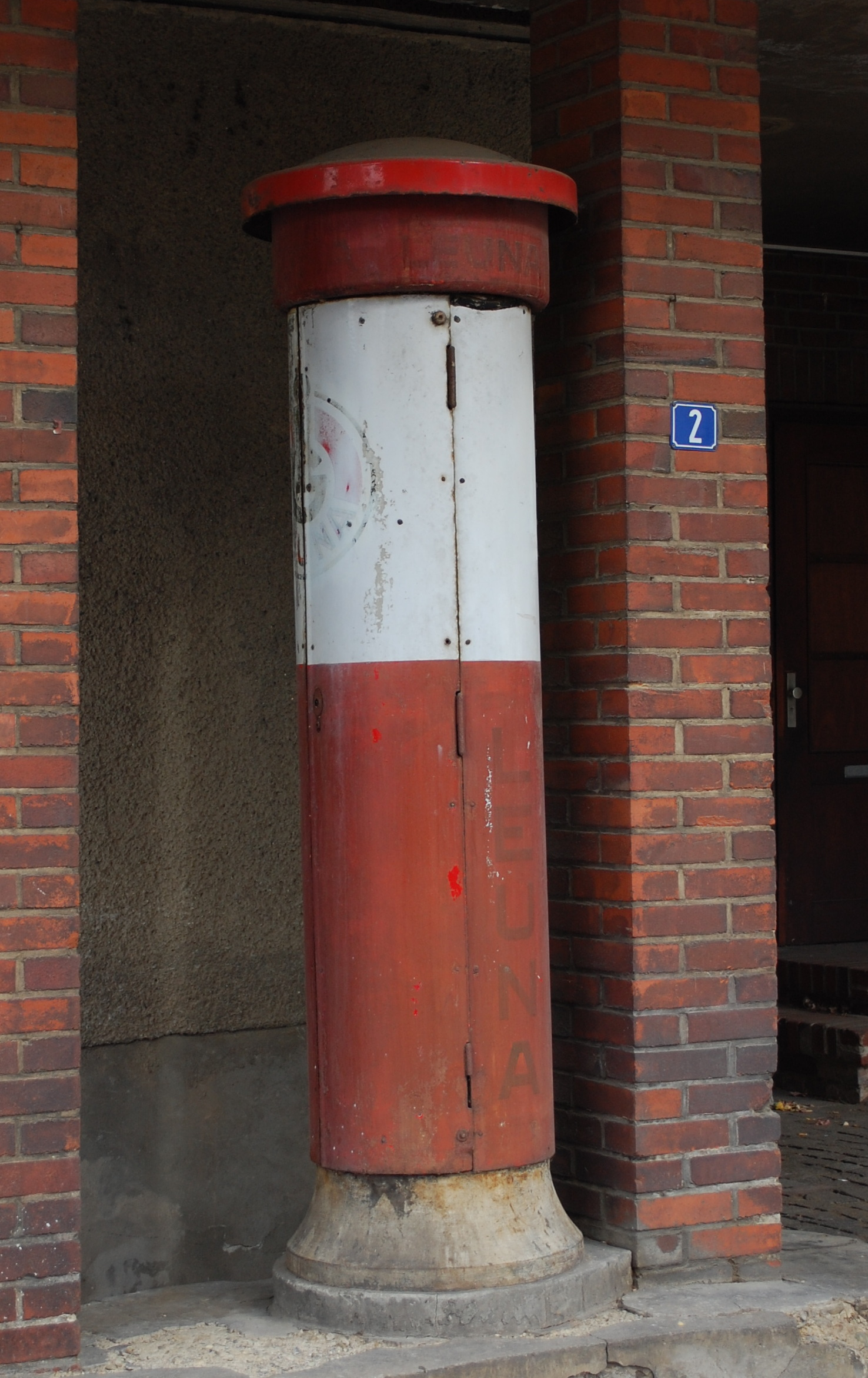 alte Tanksäule an der ehemaligen Tankstelle Am Hospital 2 in Quedlinburg